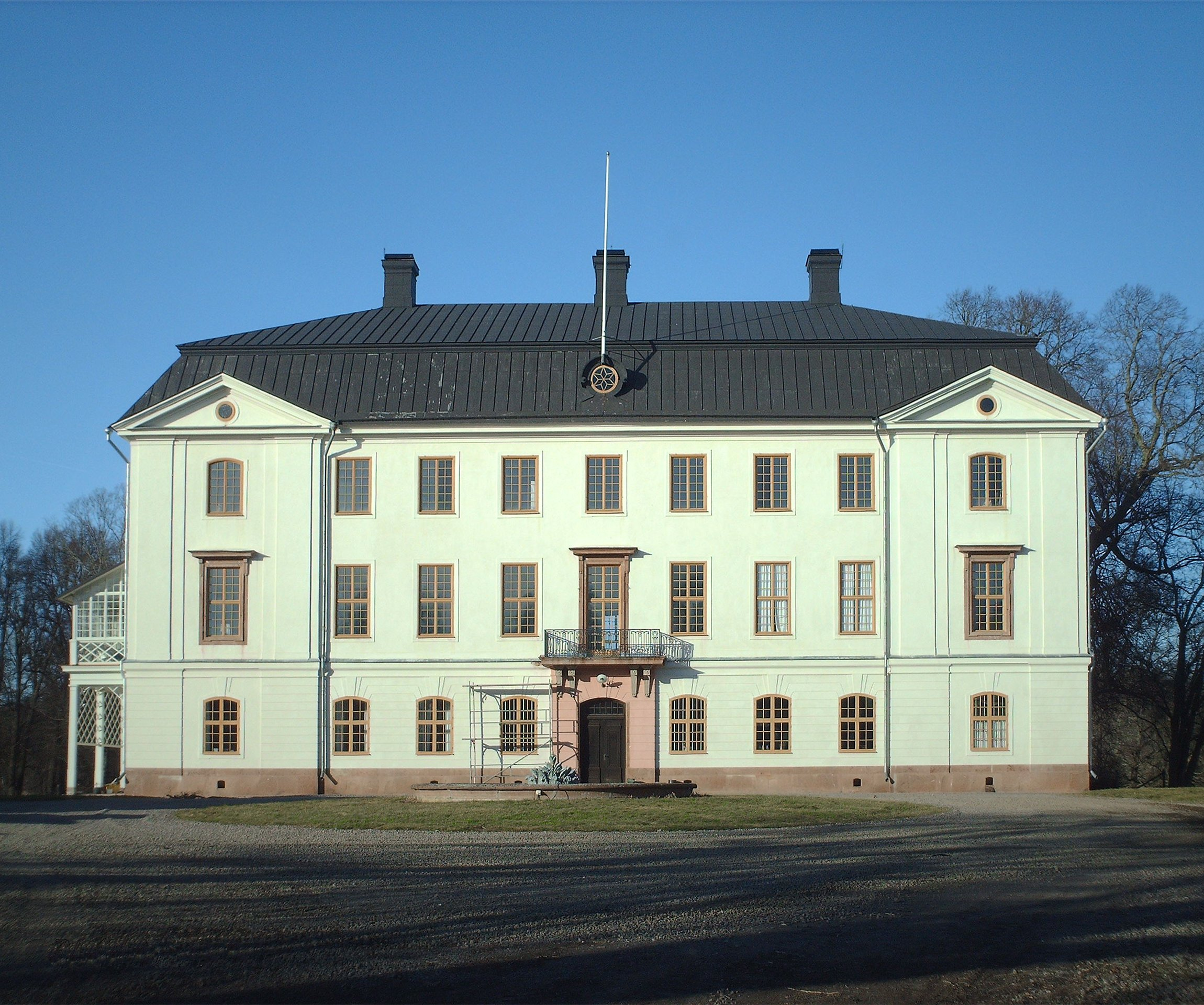 Ljungs slott, Östergötland